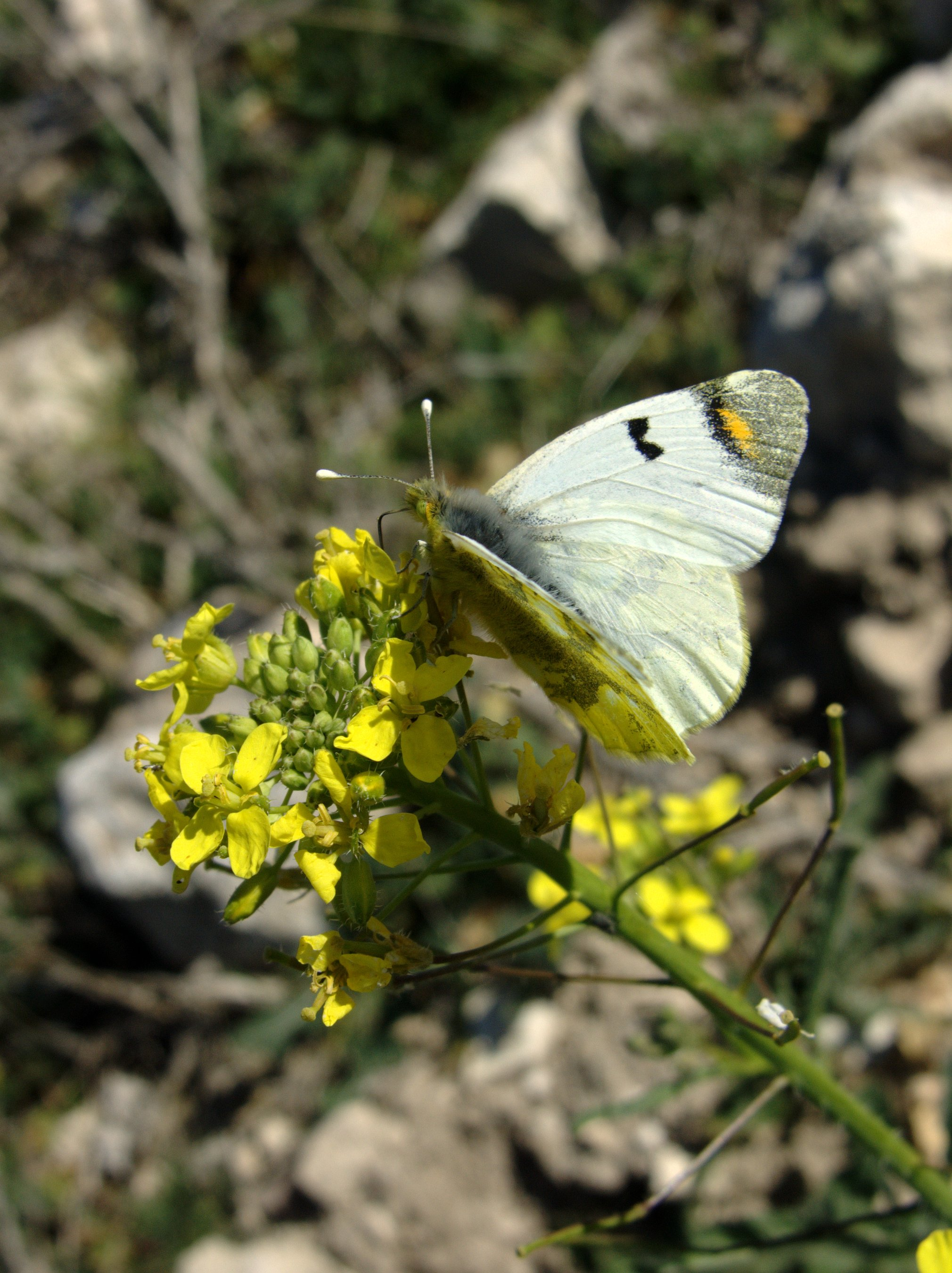 Zegris eupheme (Pieridae). Rivas Vaciamadrid, Madrid, España.